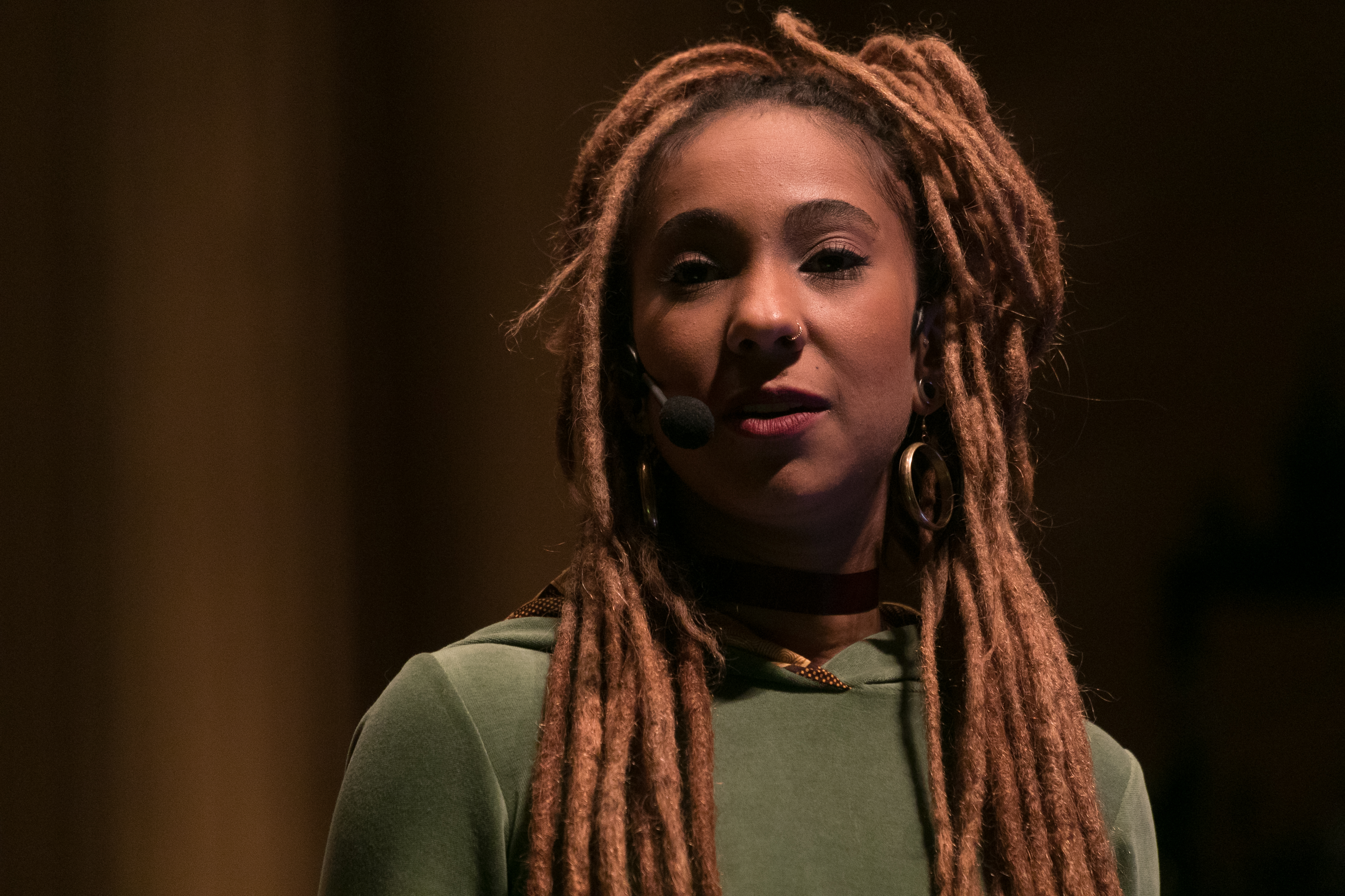 Mel Duarte lors du TEDxSaoPaulo le 6 novembre 2017.